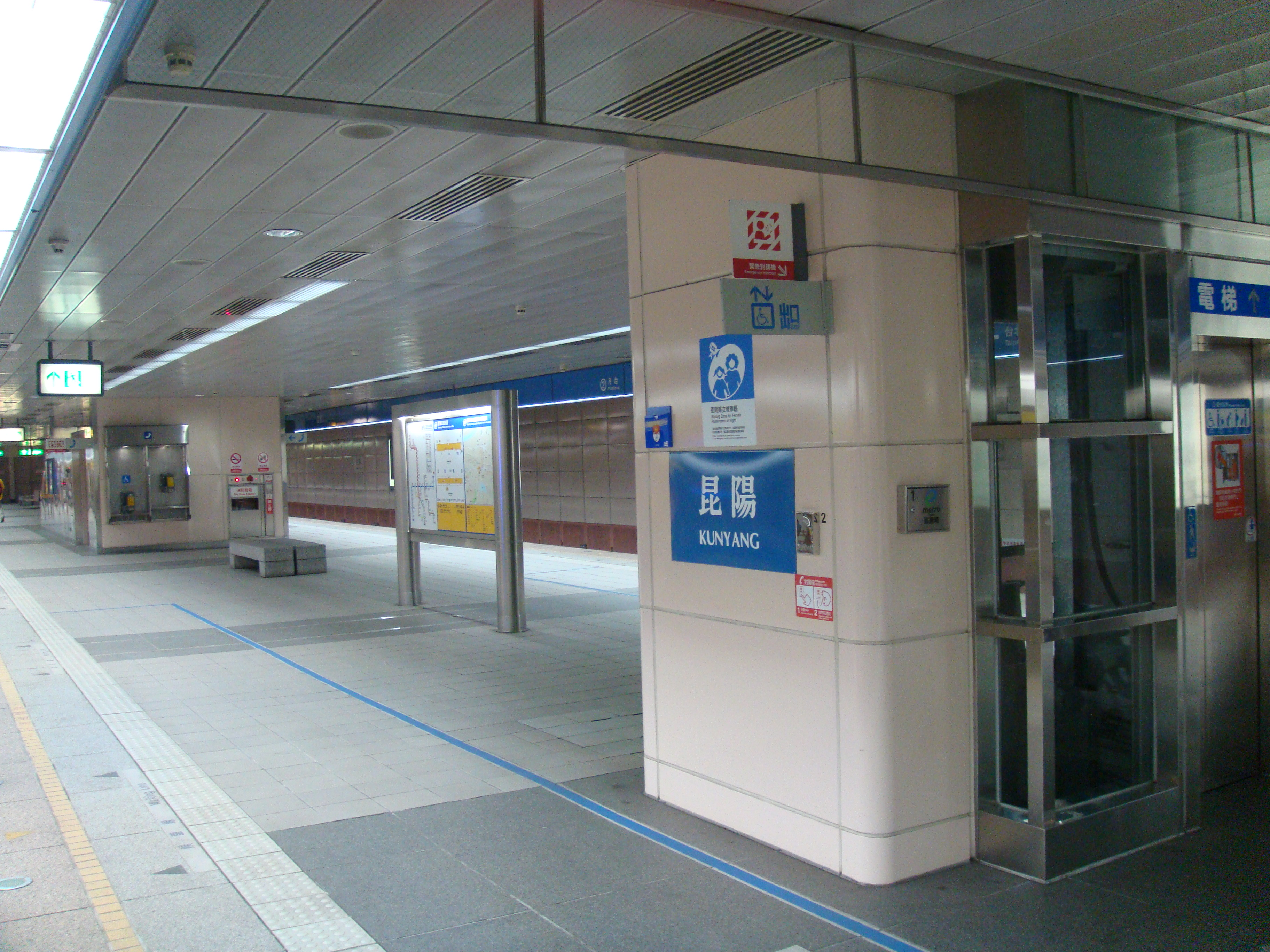 Kunyang Station, Nangang Line, Taipei Metro, Taiwan.